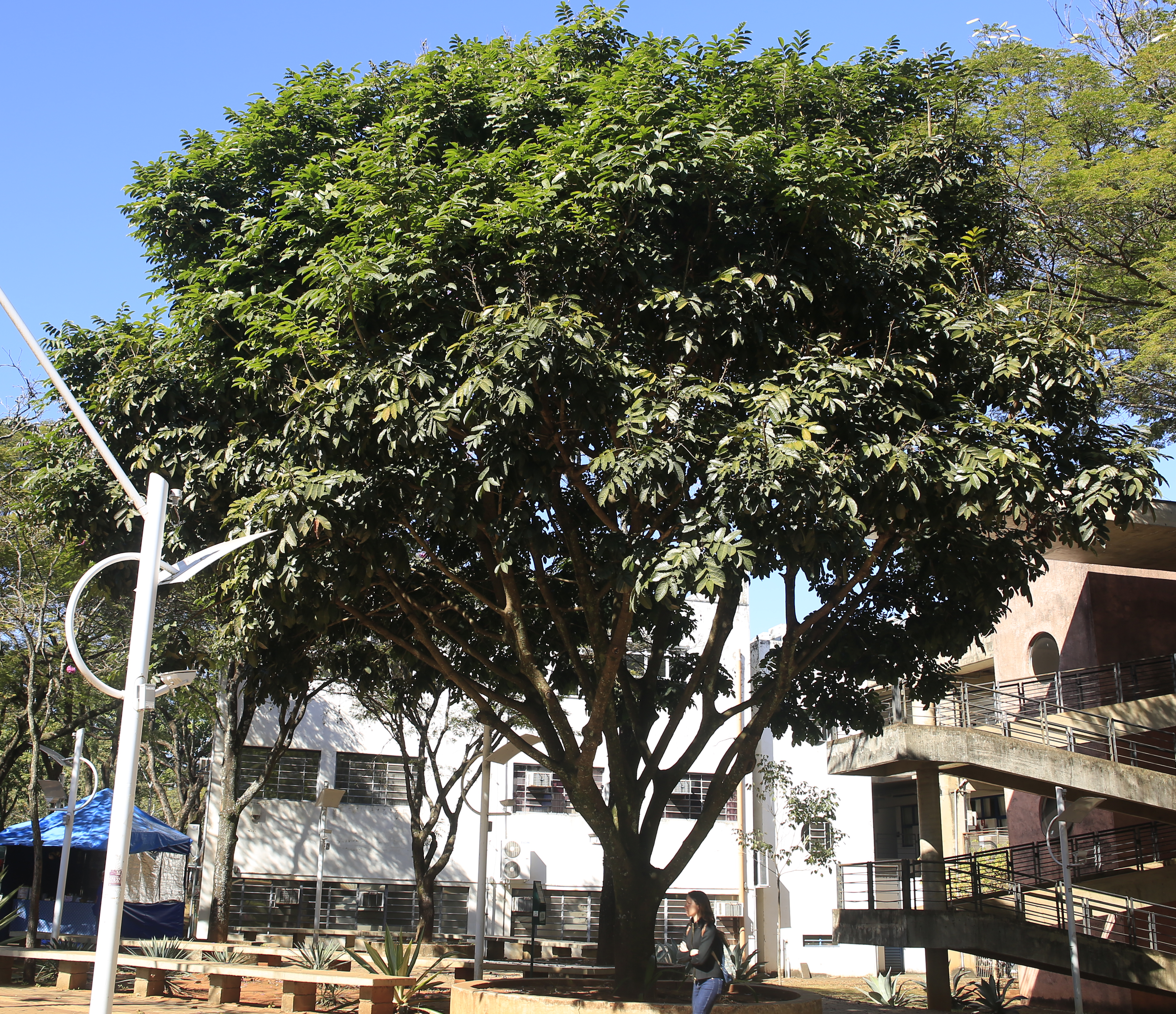 Ormosia arborea do PB unicamp, Campinas - SP, Brasil.